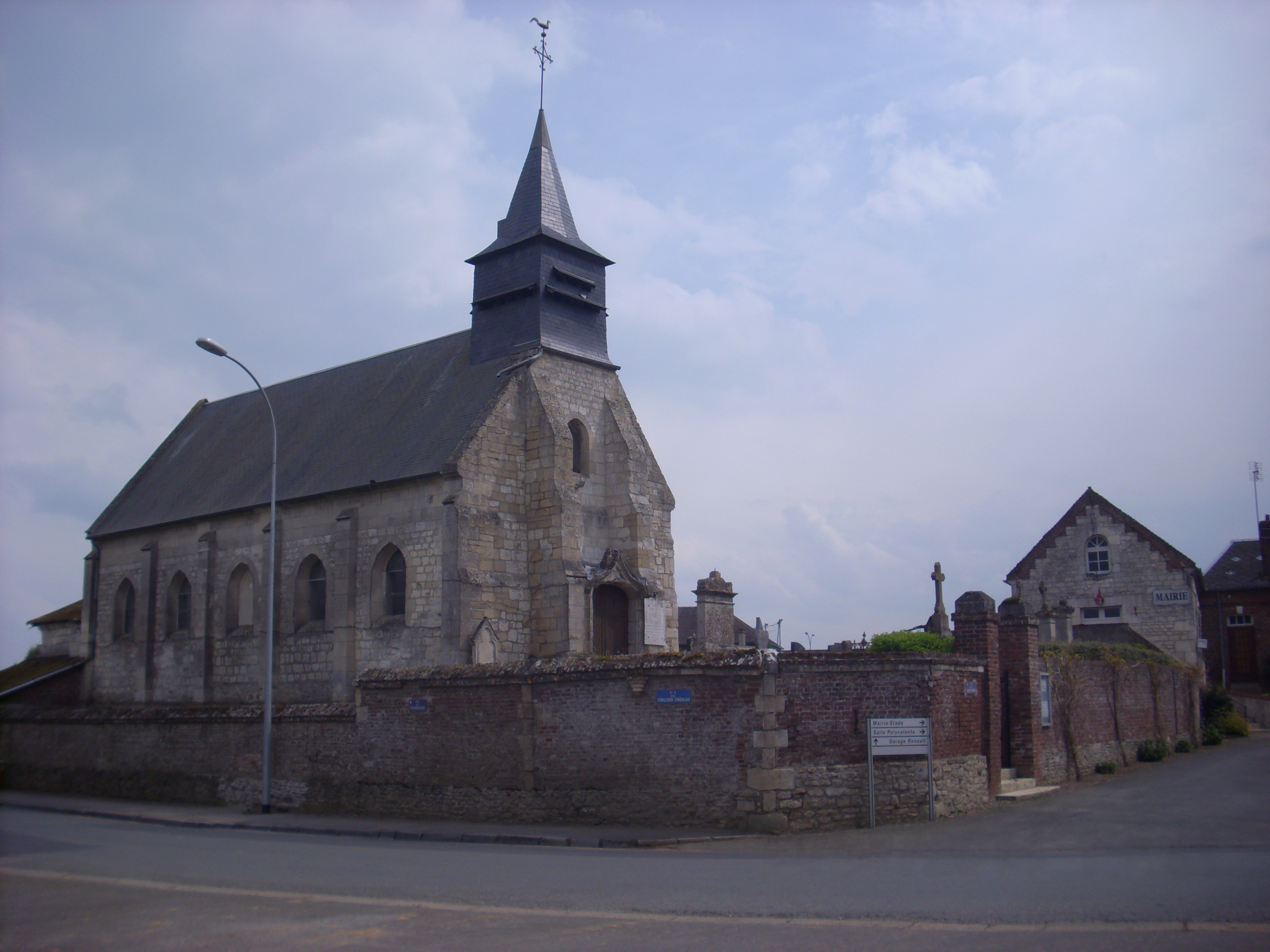 Mairie et église d'Erquinvillers